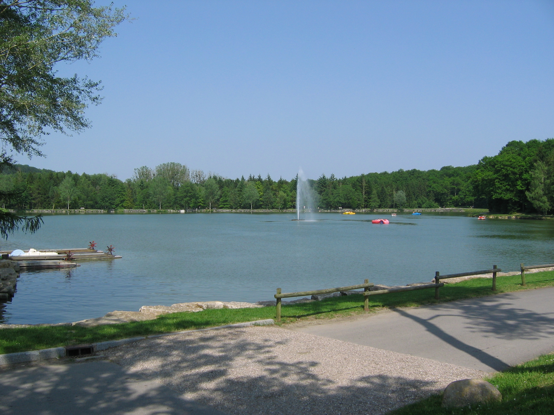 Lacs de Contrexéville, dits les lacs de la Folie, Vosges, Lorraine, France